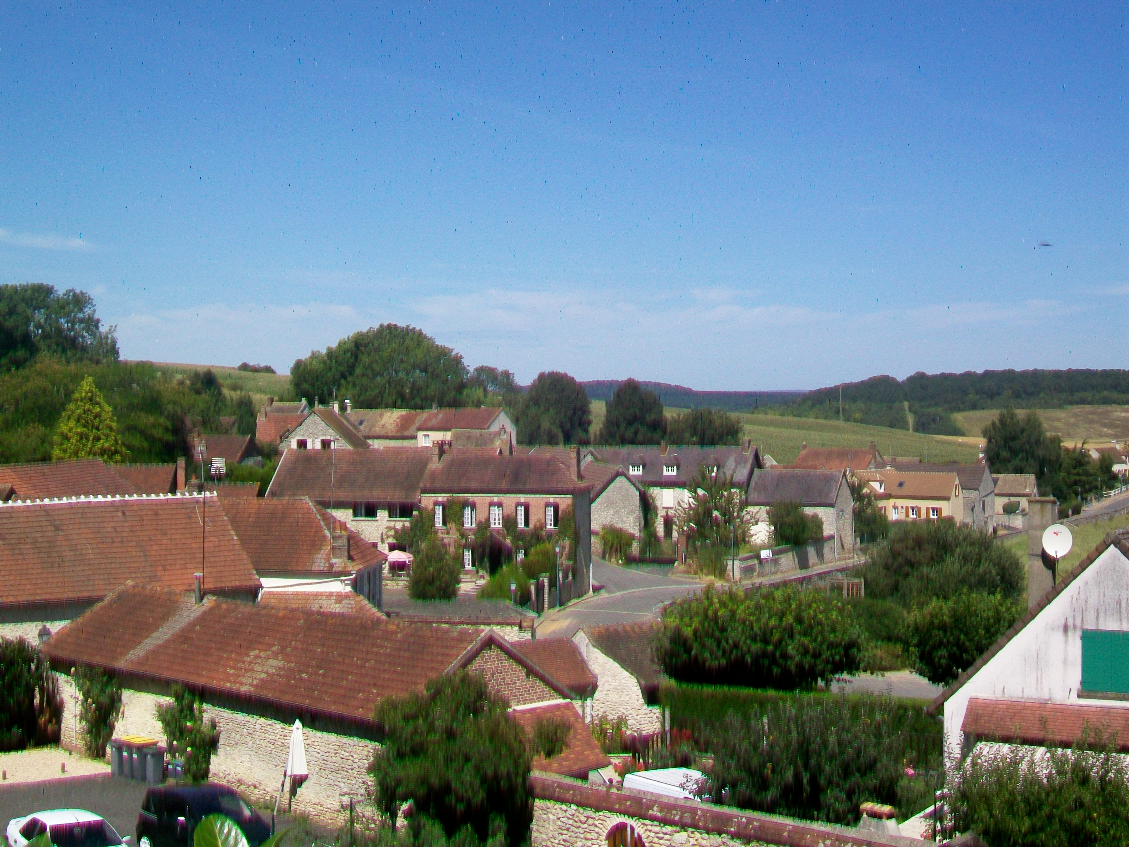 Vue sur l'ouest du village depuis la rue du Trésor.